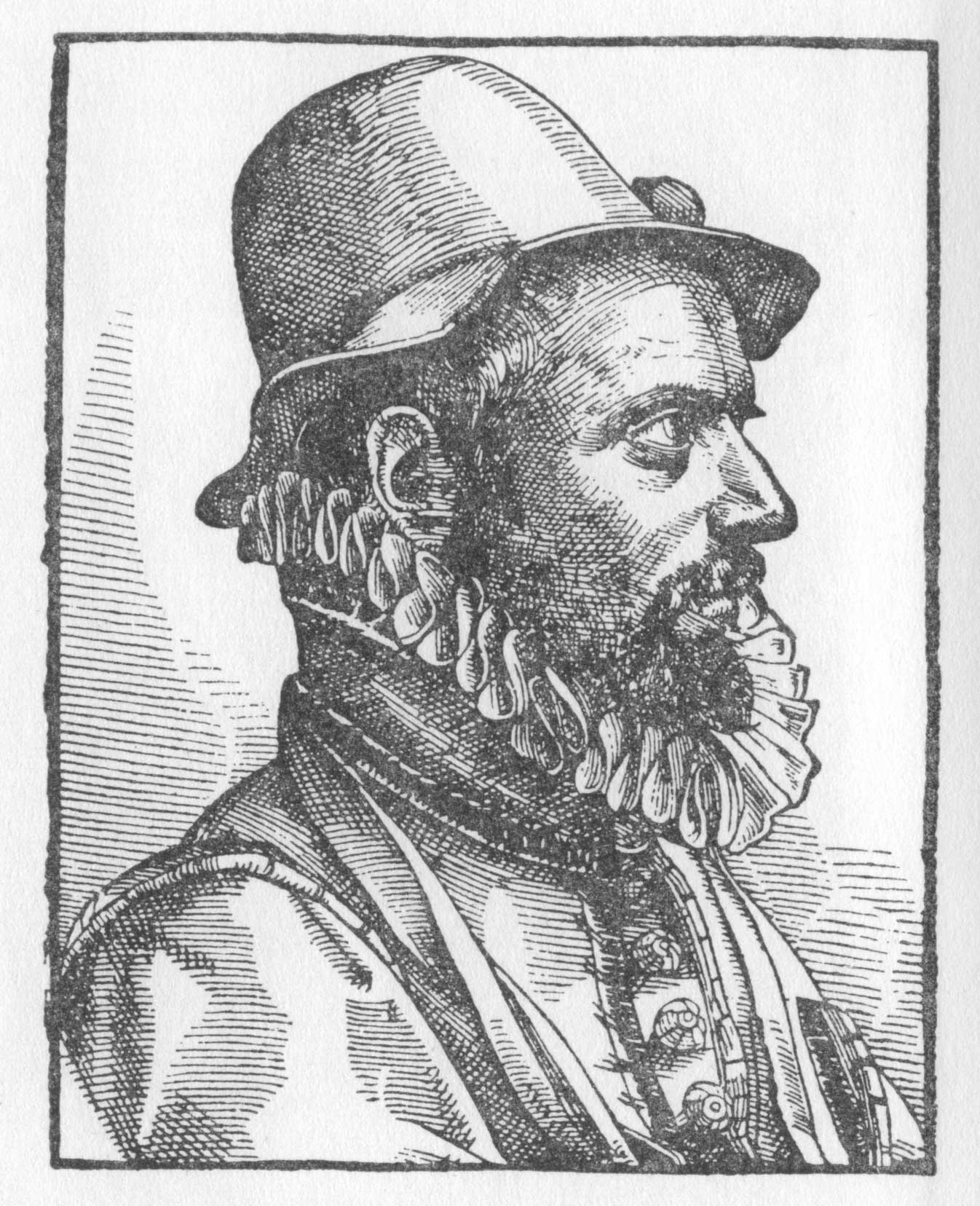 Einziges authentisches Portrait Johann Fischarts (hiernach wurden im 19. Jh. zahlreiche, auch schlechte Kopien angefertigt).